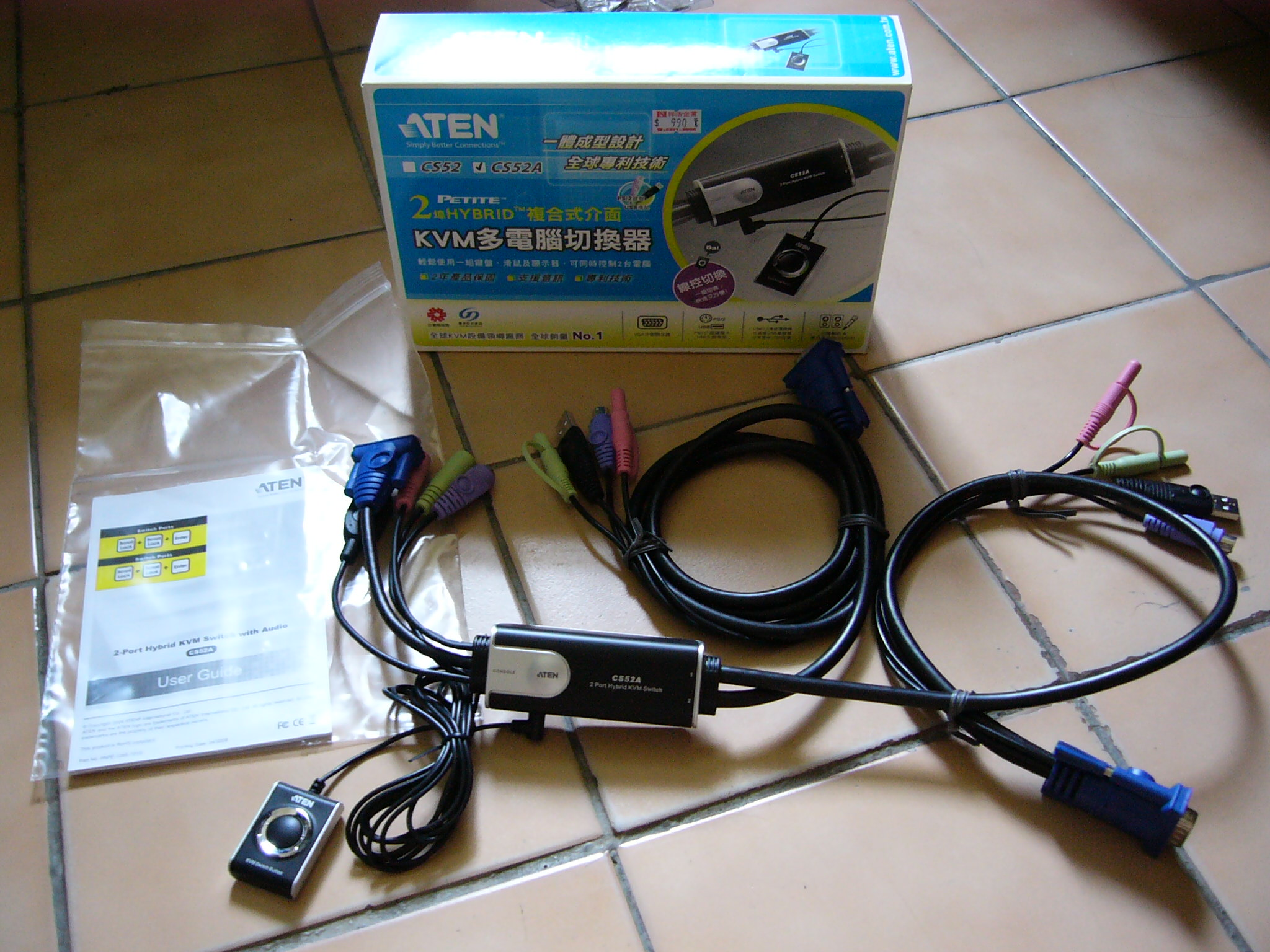 宏正自動科技KVM切換器CS52A可以1個D-sub顯示器、1個PS/2鍵盤與1個USB 2.0滑鼠操作2台電腦，控制端為D-sub、USB 2.0、PS/2、音效輸出、音效輸入各1個插作，電腦端為D-sub、USB 2.0、PS/2、音效輸出、音效輸入各2個插頭。最上方為CS52A的2009年版台灣中文包裝盒。